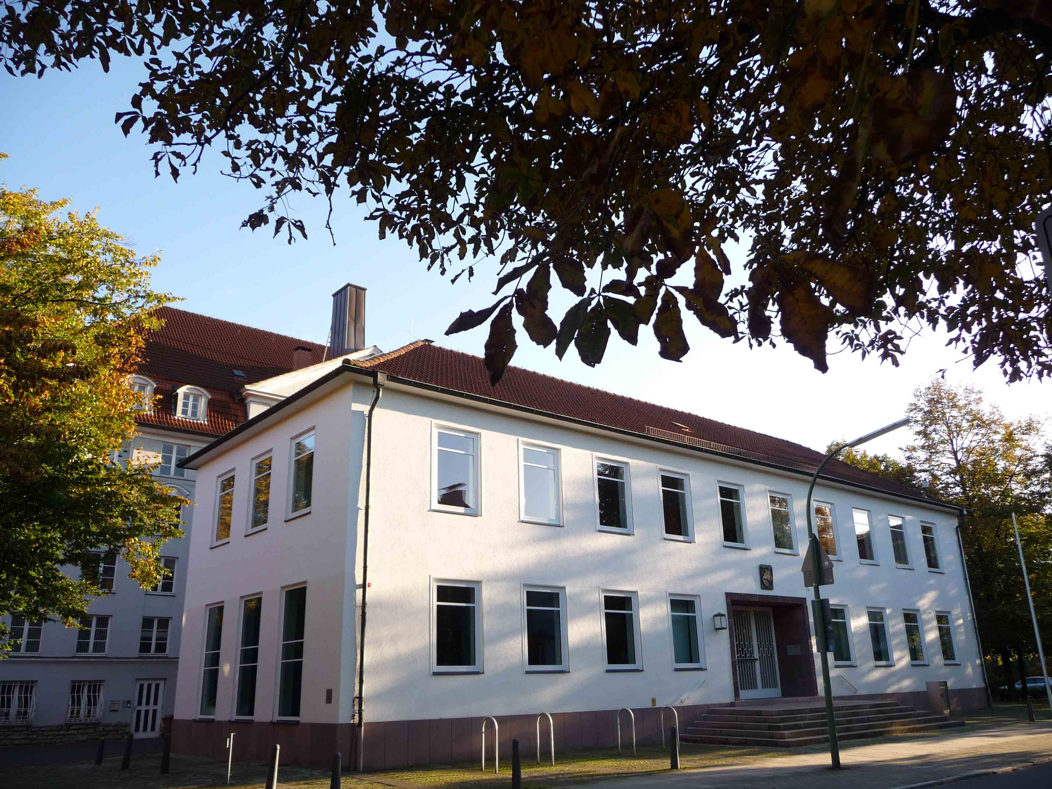 Gebäude des Niedersächsischen Landesarchivs - Standort Osnabrück von der Schloßstraße